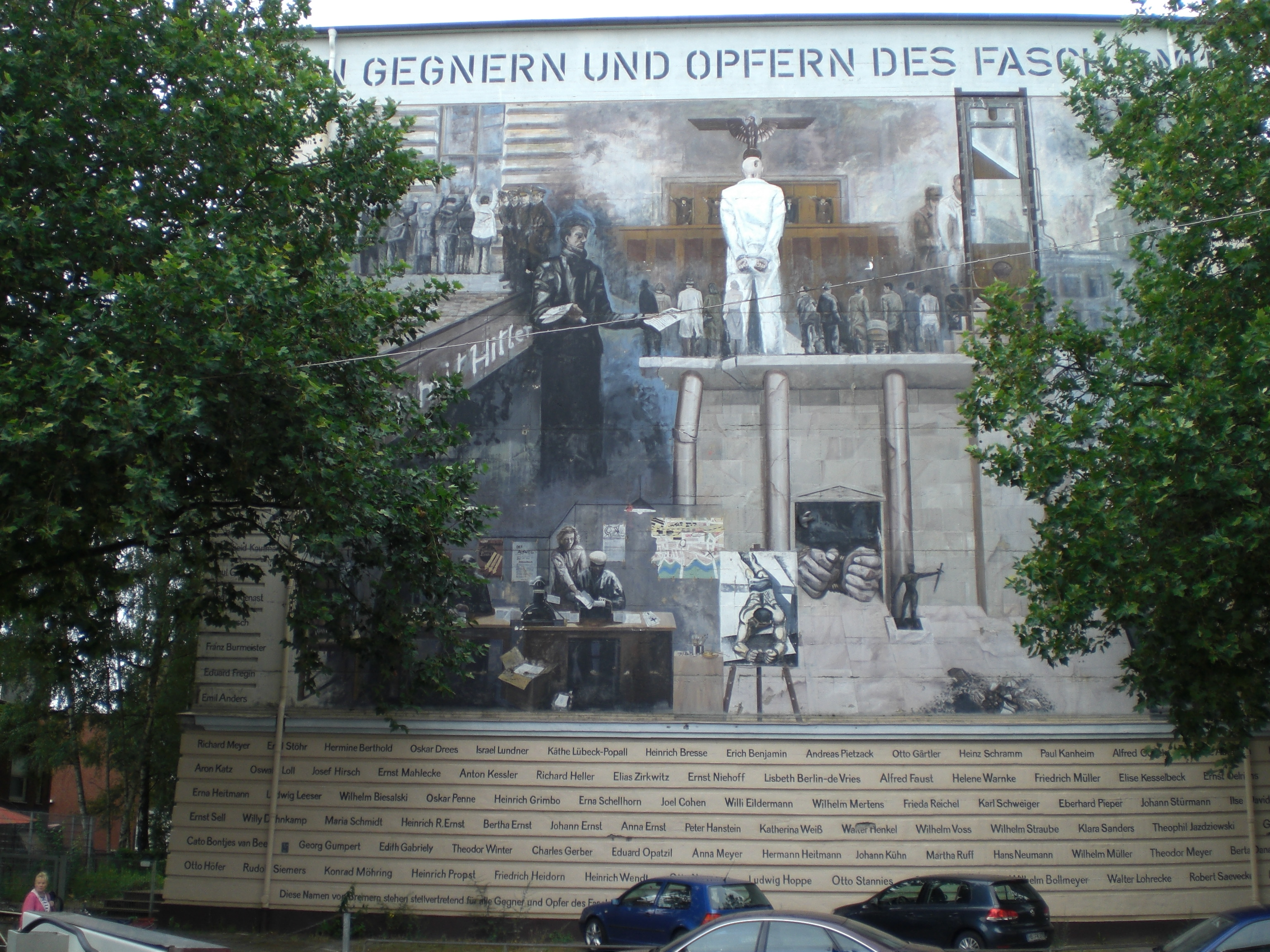 "Den Gegnern und Opfern des Faschismus", Wandbild in Bremen-Findorff